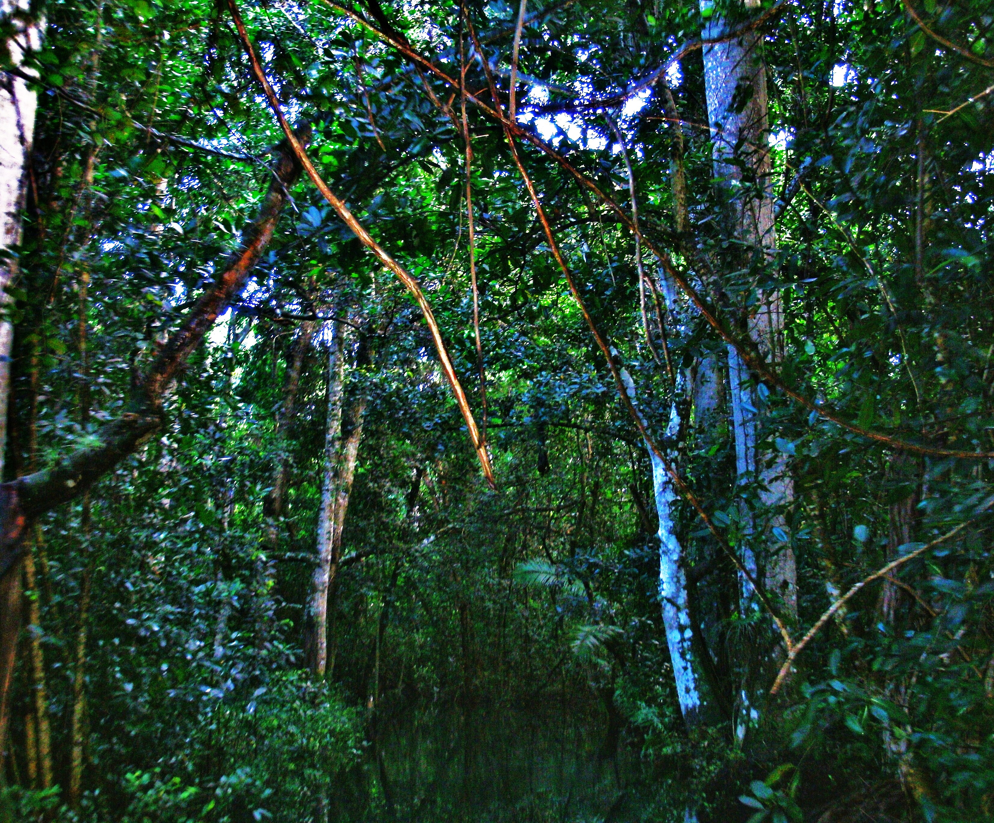 Dans les marais de Zapata